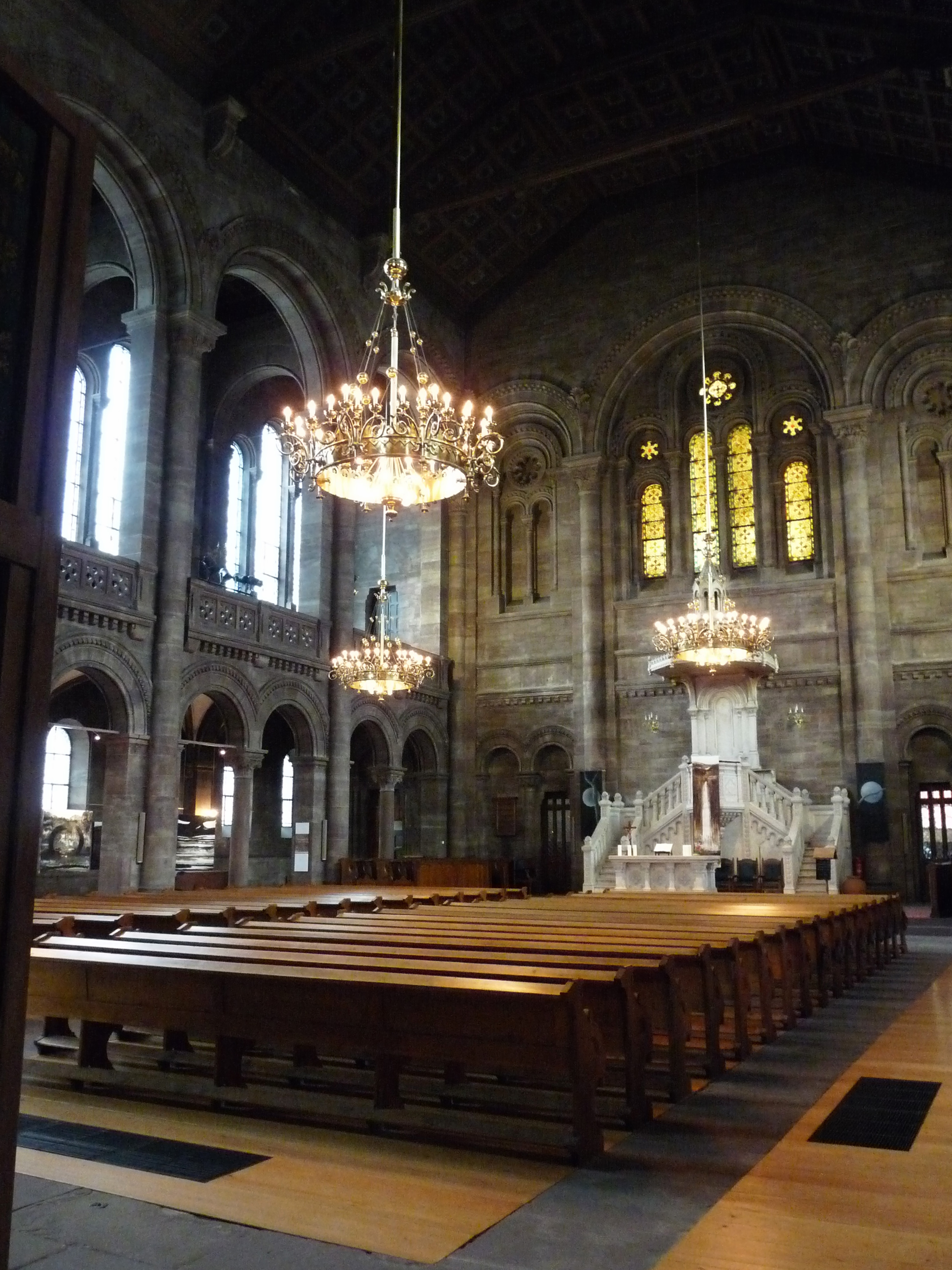 Eglise du Temple Neuf (Strasbourg)